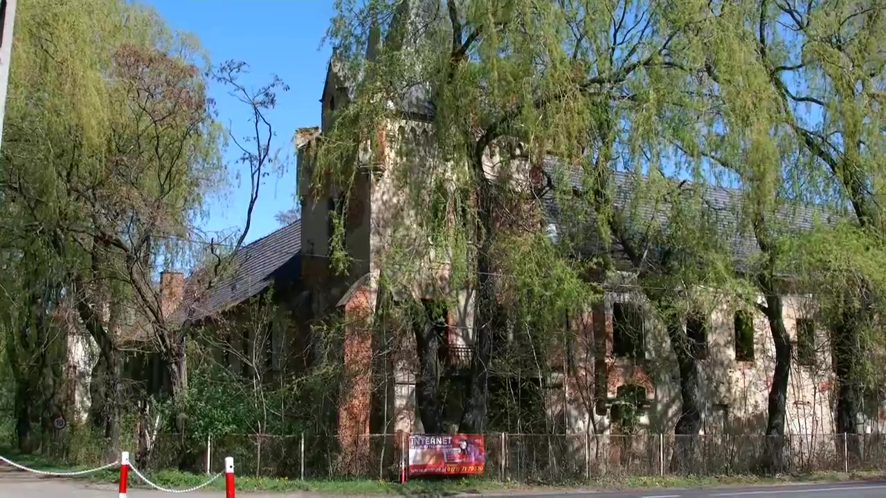 Zamek w Łące Prudnickiej widziany od strony drogi w kierunku Prudnika. Od pewnego czasu w rękach prywatnych i ulegający kompletnej ruinie. Niedaleko tego miejsca znajduje się rzeźba świętego Jana Nepomucena, Sam zamek nieco zniszczony w czasie wojny, a kompletna dewastacja nastąpiła w ostatnim dwudziestoleciu.